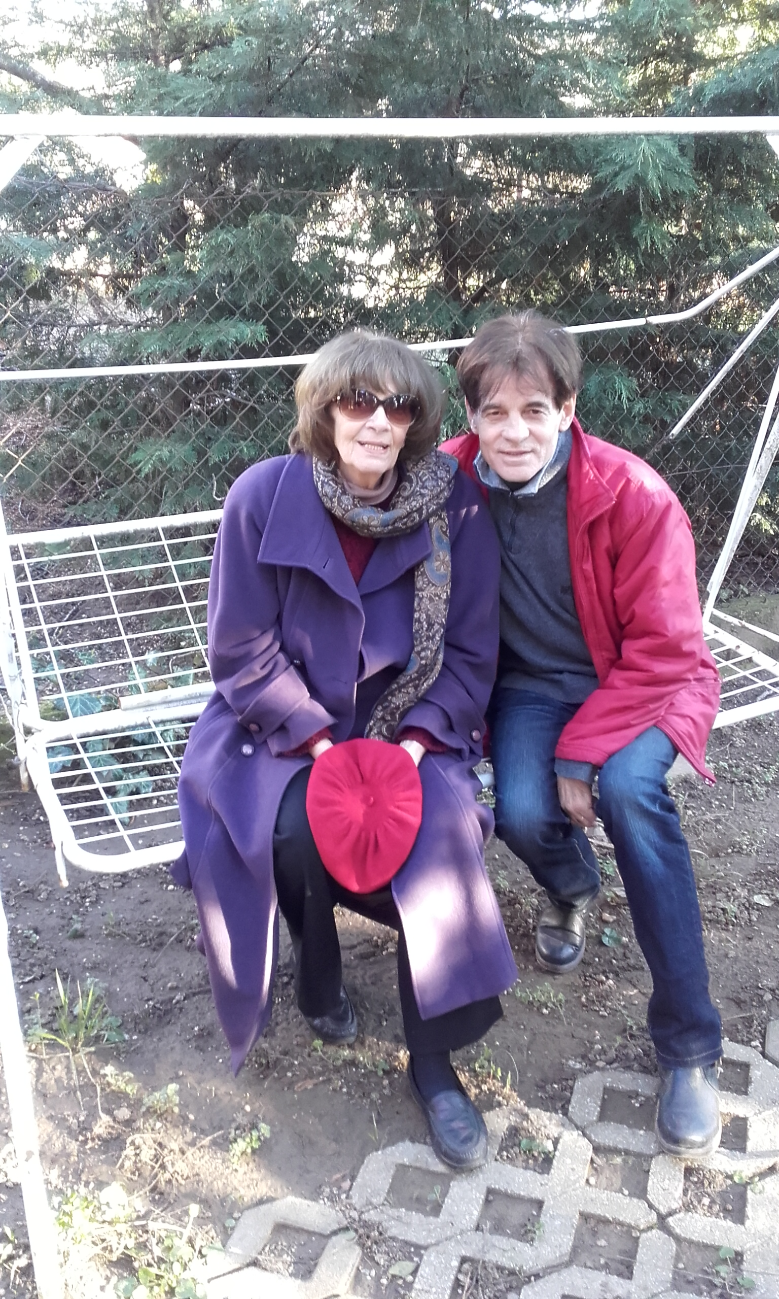 Márk László operaénekes és felesége Jánosi Olga színésznő, tolmács